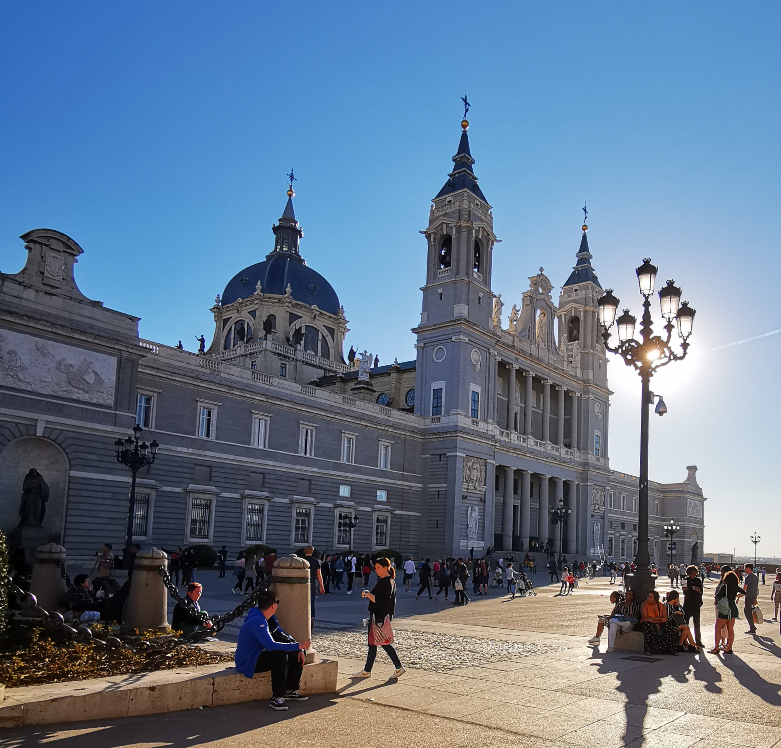 Cathédrale de la Almudena, Madrid, Espagne